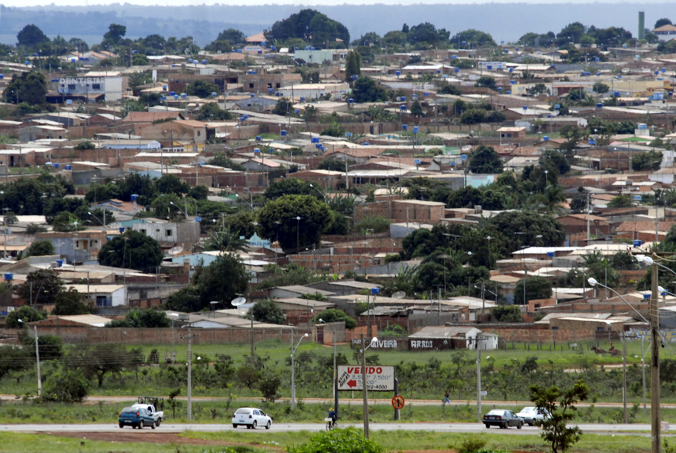 Águas Lindas de Goiás